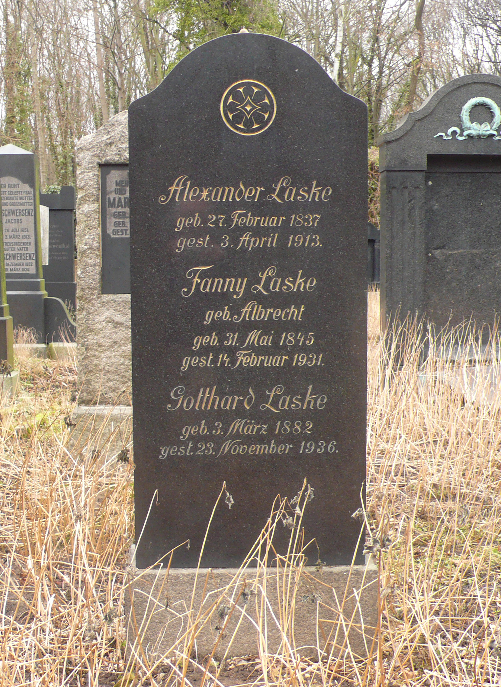 Grabstätte Familie Laske auf dem jüdischen Friedhof in Berlin Weißensee